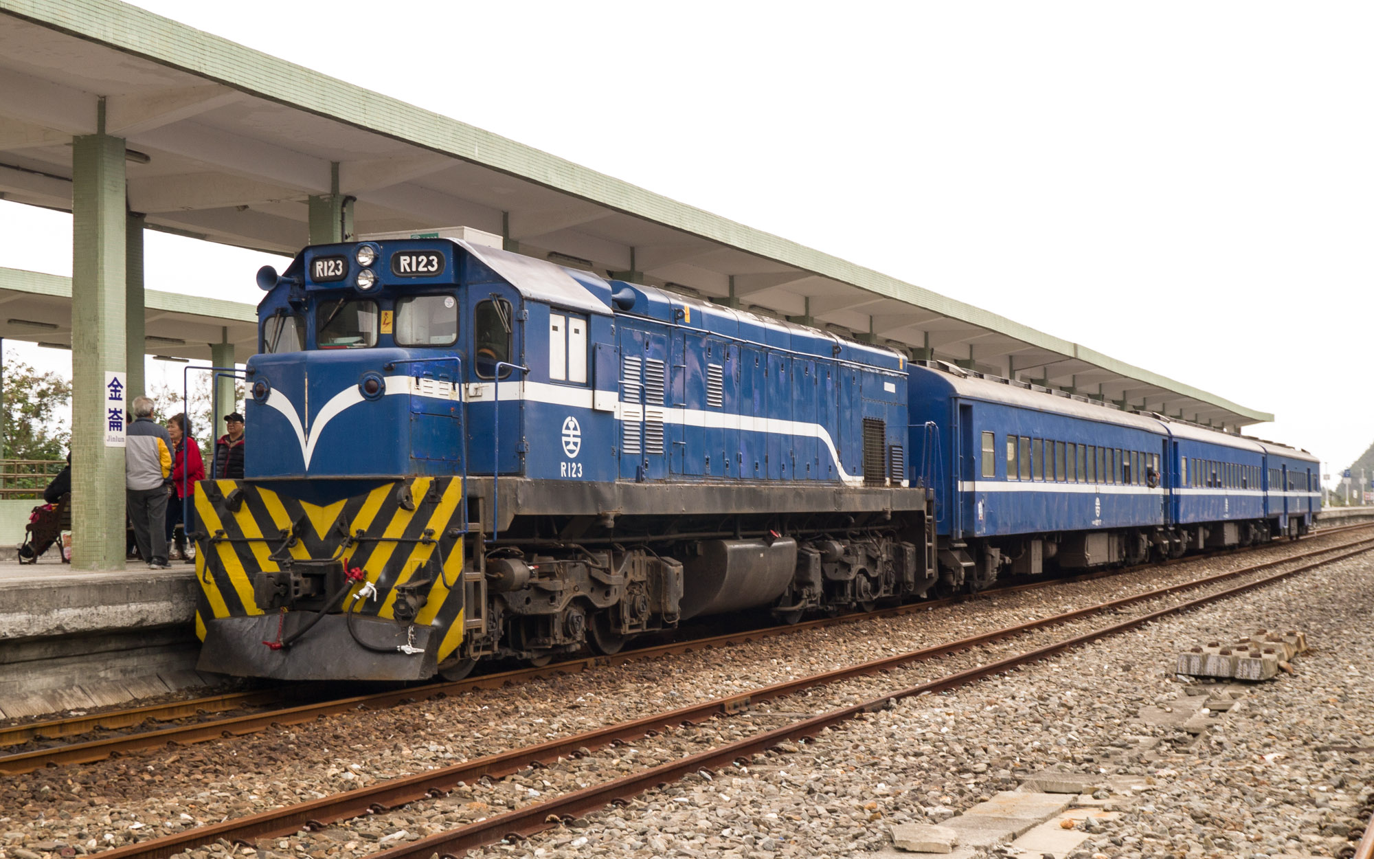 臺灣鐵路管理局第3671車次普快車逆行南迴線，停靠金崙車站。